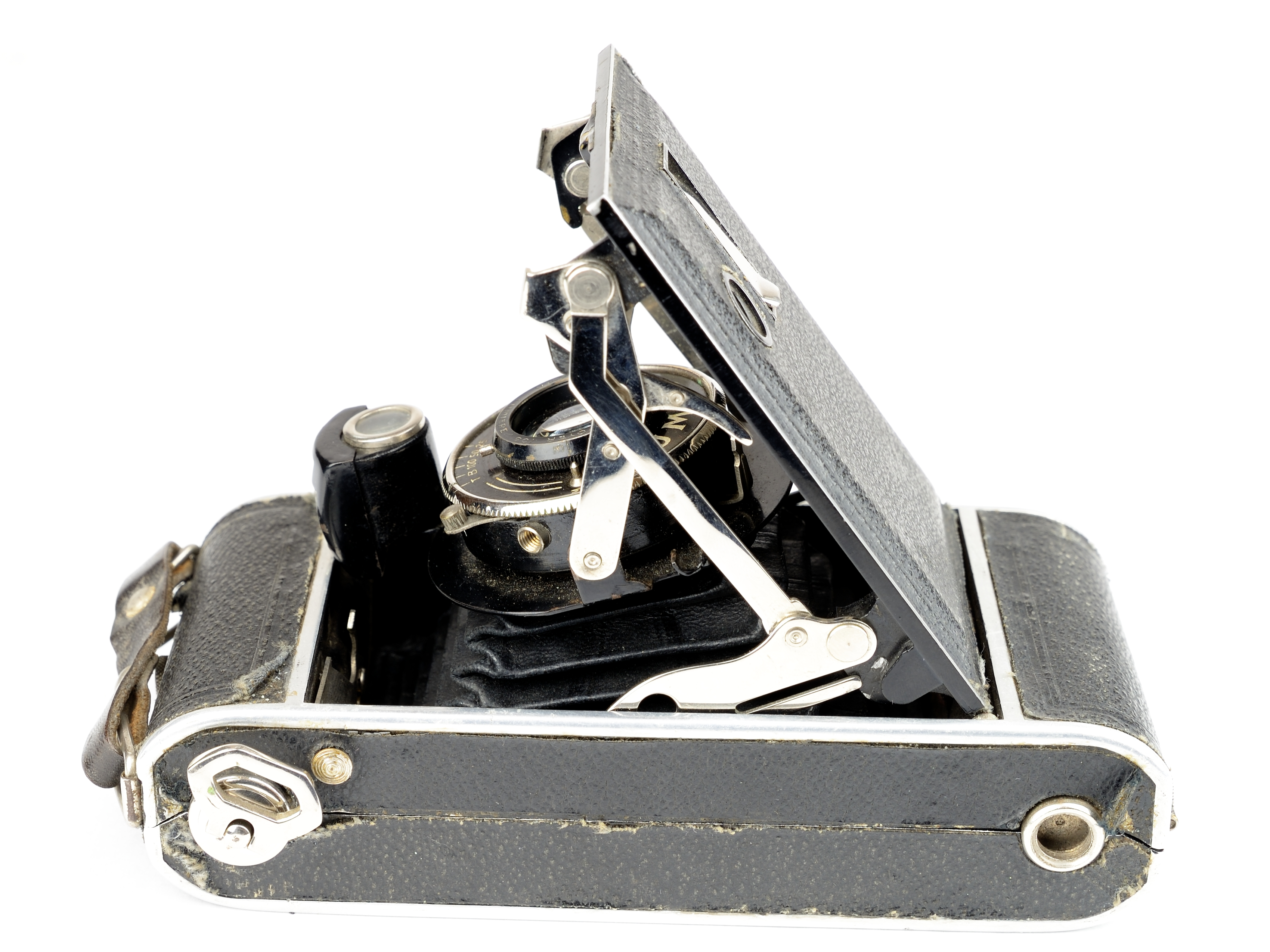 Appareil photo lumière avec objectif Lumière Nacor